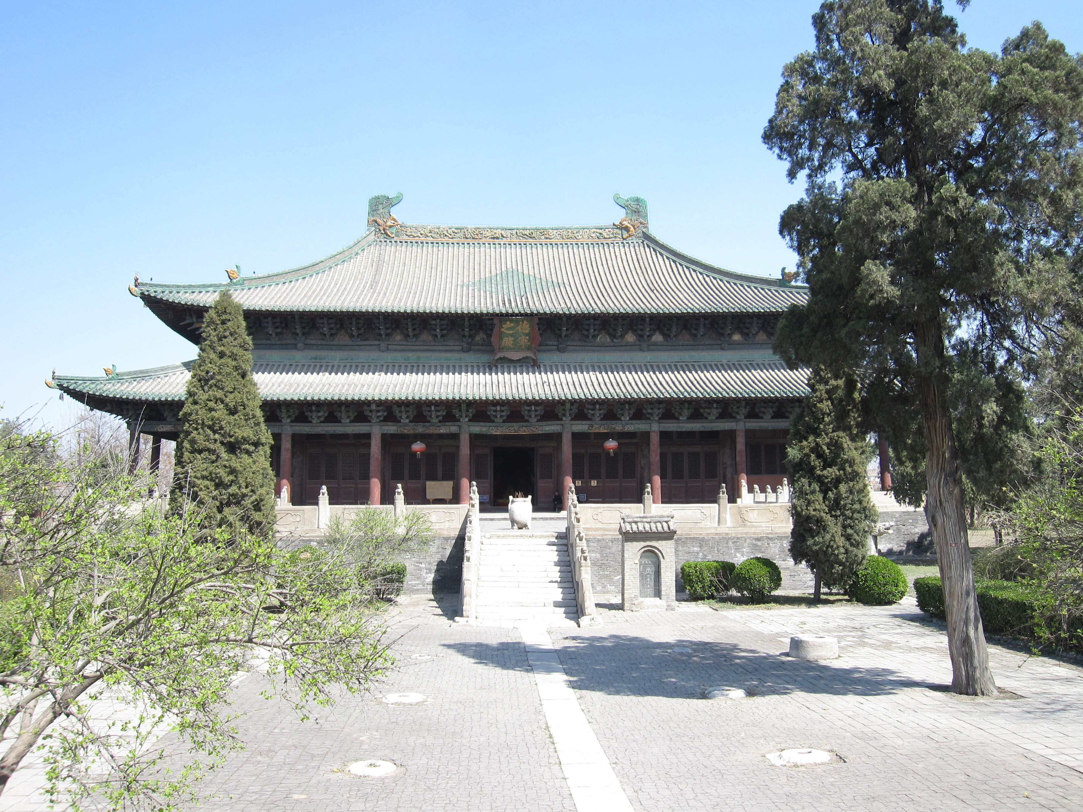 Beiyue Temple